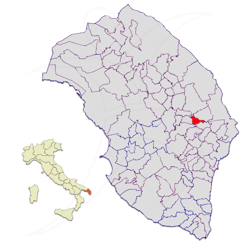 Il comune di Bagnolo del Salento nella provincia di Lecce